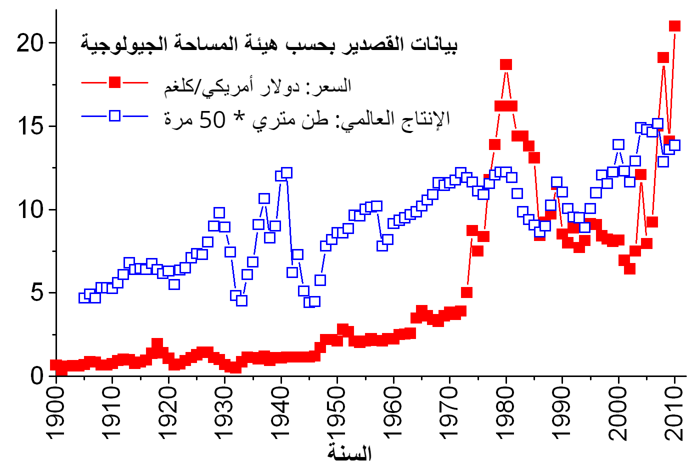 بيانات عن إنتاج القصدير العالمي وسعره في الولايات المتحدة الأمريكية بحسب هيئة المساحة الجيولوجية الأمريكية.